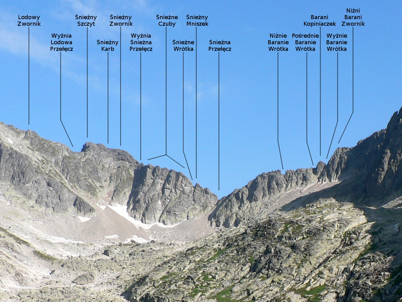 Śnieżny Szczyt i Śnieżna Przełęcz